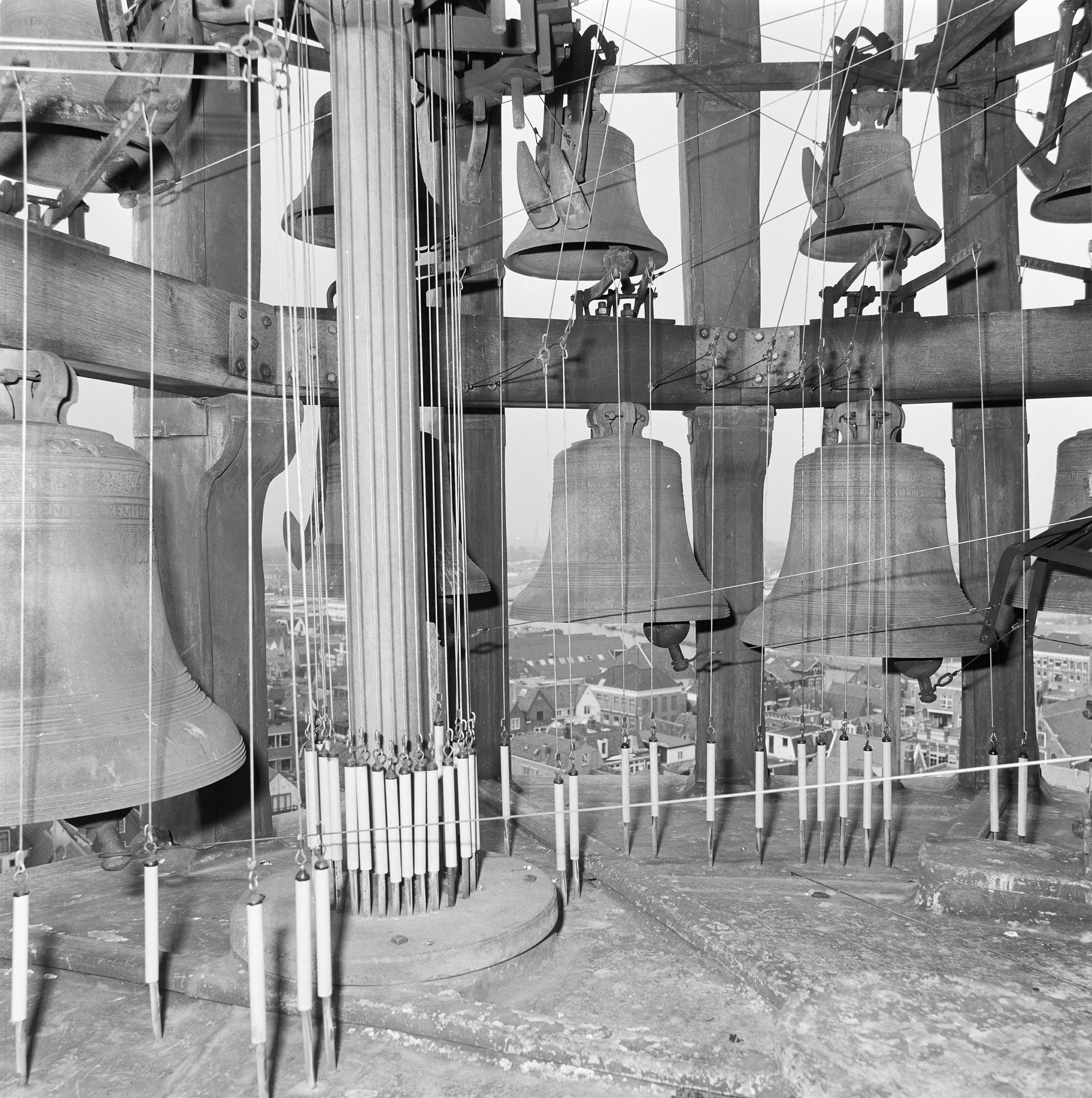 WAAG: INTERIEUR, TOREN, OVERZICHT, KLOKKENSPEL